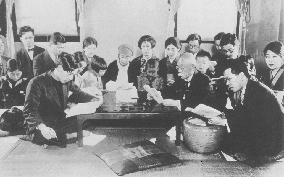 Waseda jidō engeki kenkyūkai (早稲田児童演劇研究会)